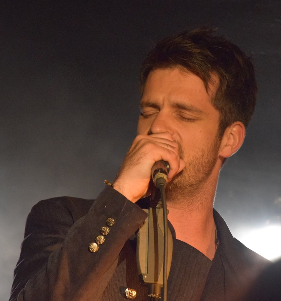 Corson le 5 avril 2014 en concert à La Péniche, Lille